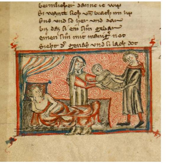 Gottfried von Straßburg, Tristan und Isolde – Handschrift von 1323 im Historischen Archiv der Stadt Köln Best. 7020 (W*) 88